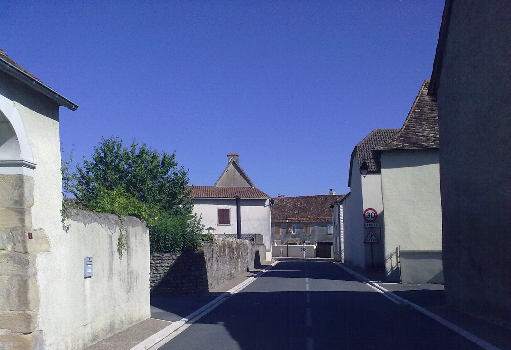 Bastanès le 18 juillet 2010, France.